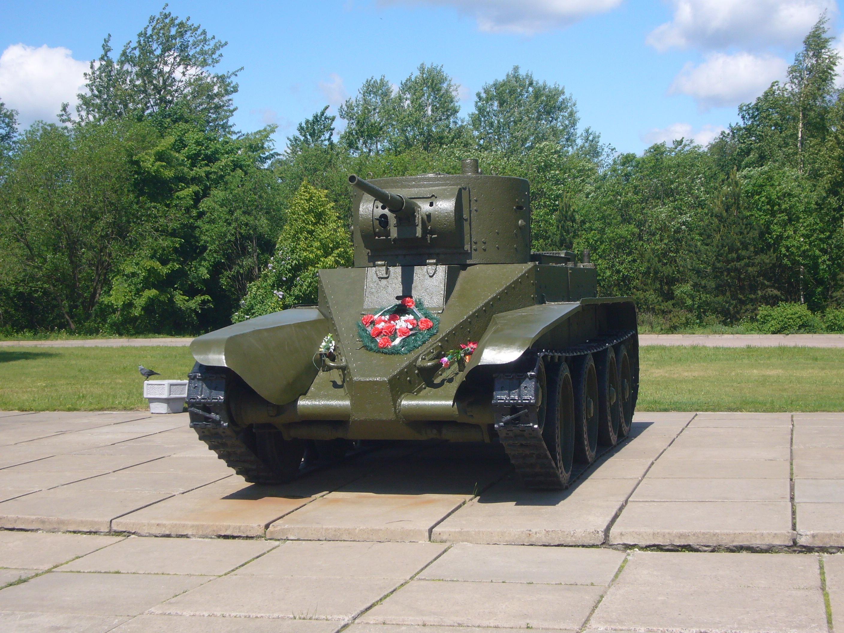 БТ-5 у диорамы «Прорыв блокады Ленинграда». Вид спереди.